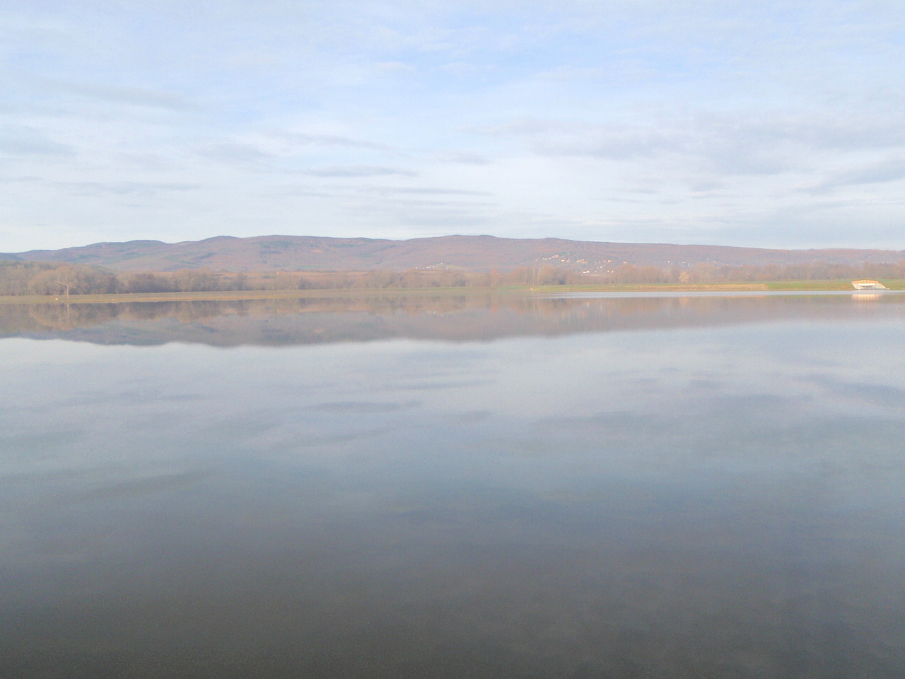 Günser Seebad bei Stadtteil Schwabendorf, hinter Günser Gebirge